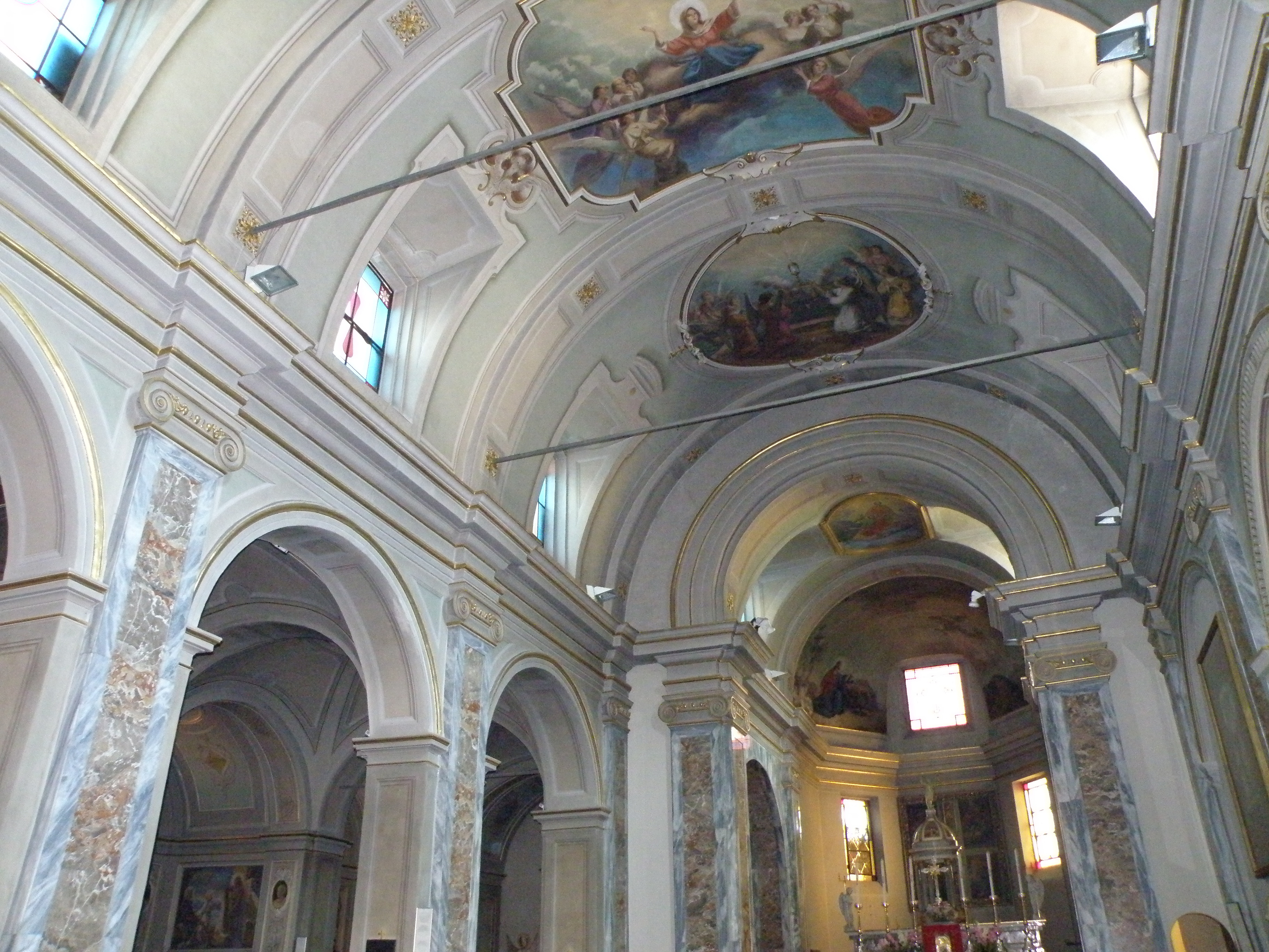 Laveno-Mombello (VA). Chiesa parrocchiale di San Filippo e Giacomo, detta Chiesa Vecchia, vista interna.